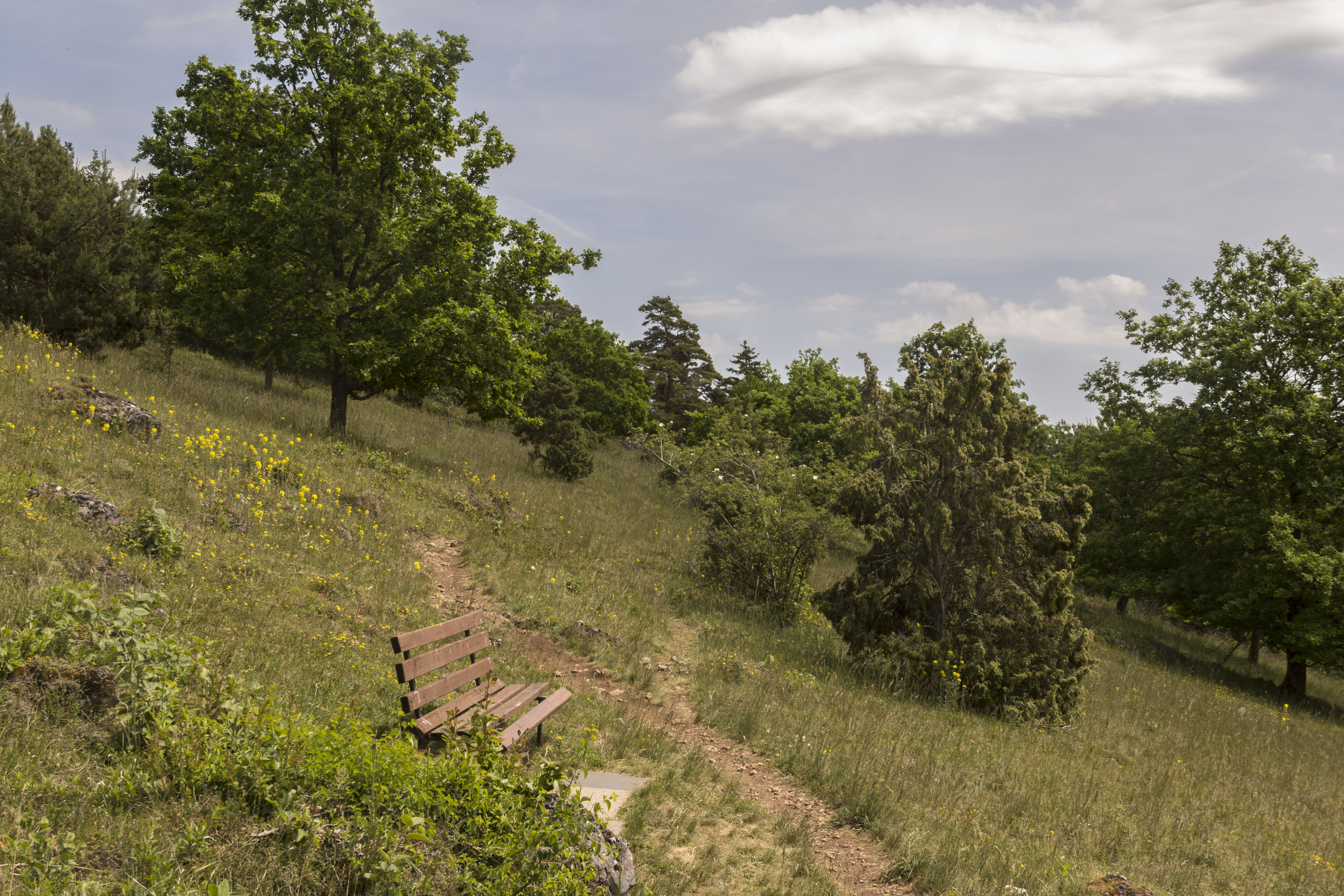 Naturschutzgebiet, Naturpark Altmühltal, Gungolding